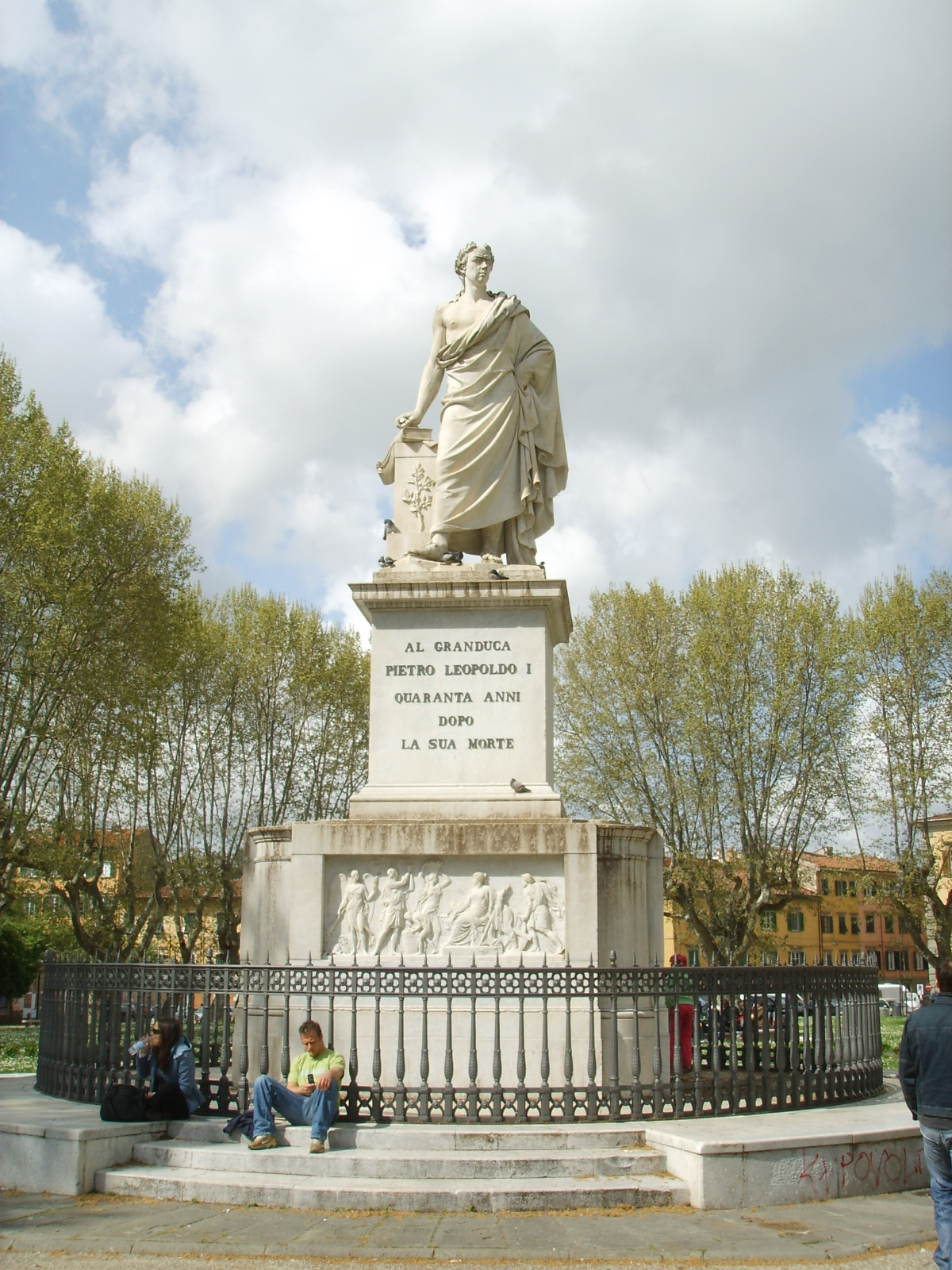 Monumento al granduca Pietro Leopoldo I in Pisa, Piazza Martiri della Libertà (Piazza Santa Caterina)